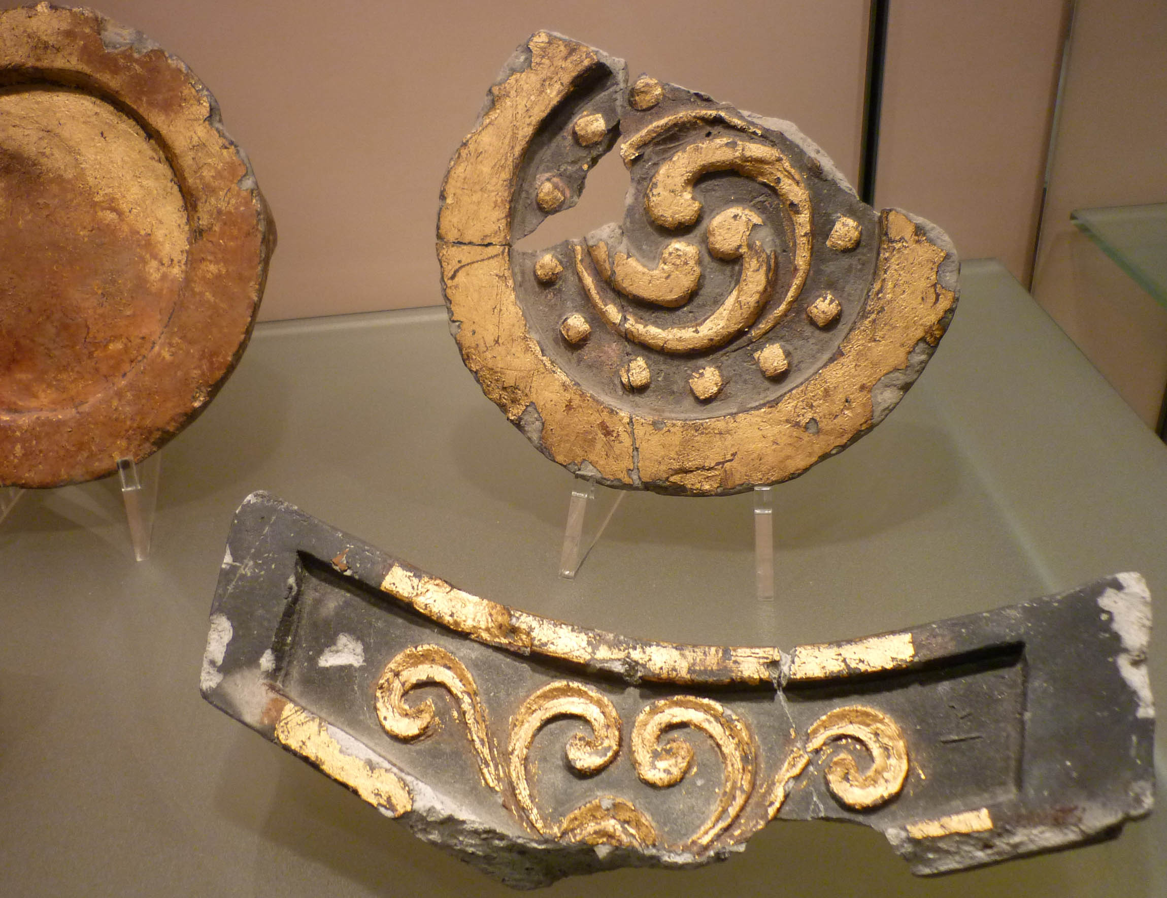 巴文金箔軒丸瓦（上）と唐分草金箔平瓦（下）